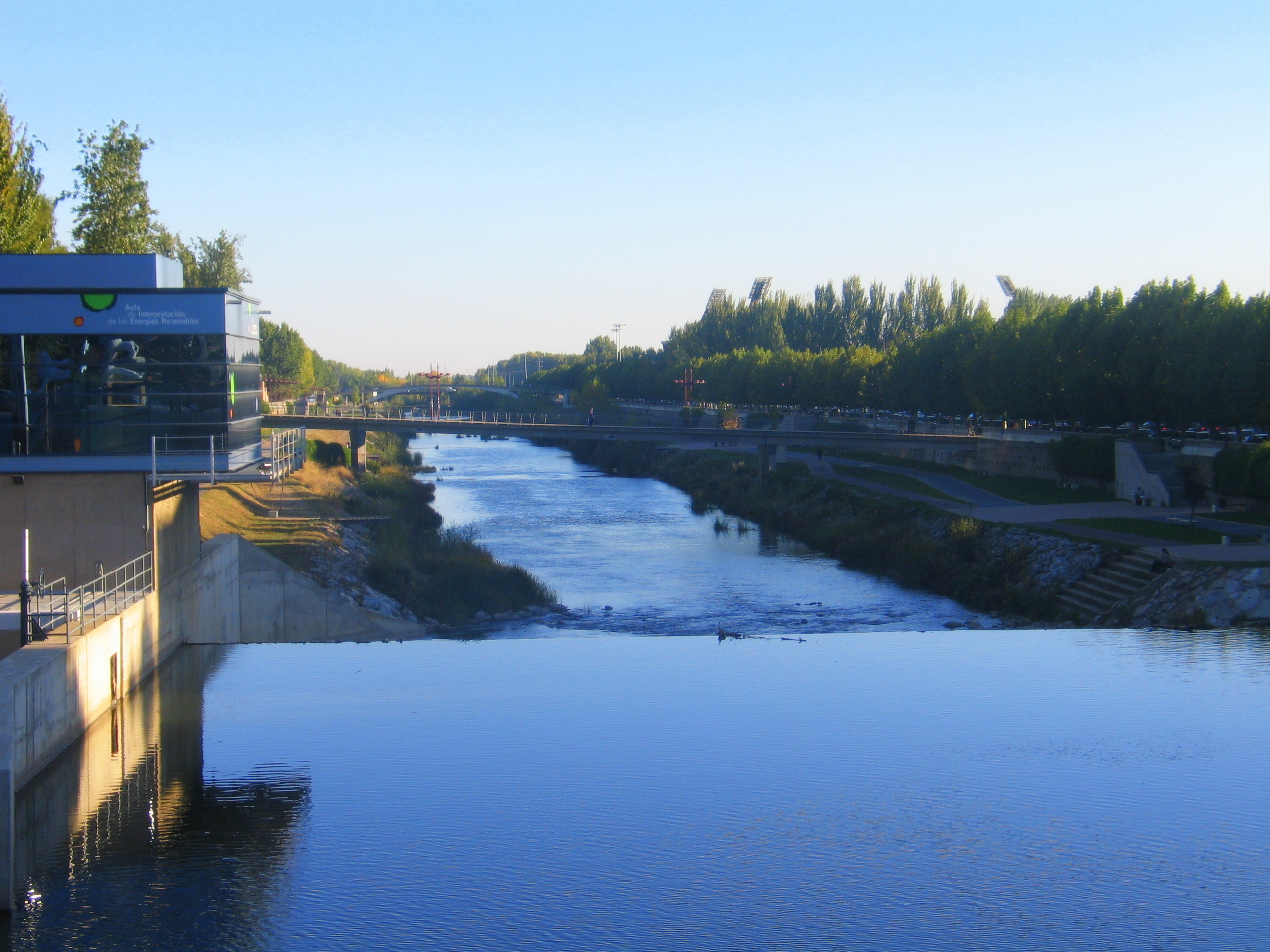 El río Bernesga a su paso por León, España.